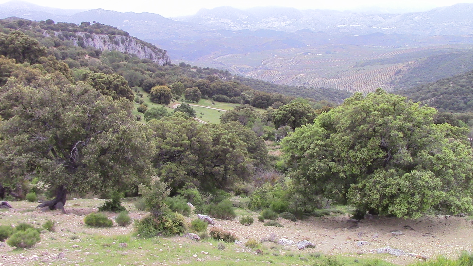 El Bosque Mediterráneo está muy presente, en el interior del Parque Natural de Sierra Mágina. This is a photography of a Special Area of Conservation in Spain with the ID: ES6160009. Natura2000 entry, EEA entry